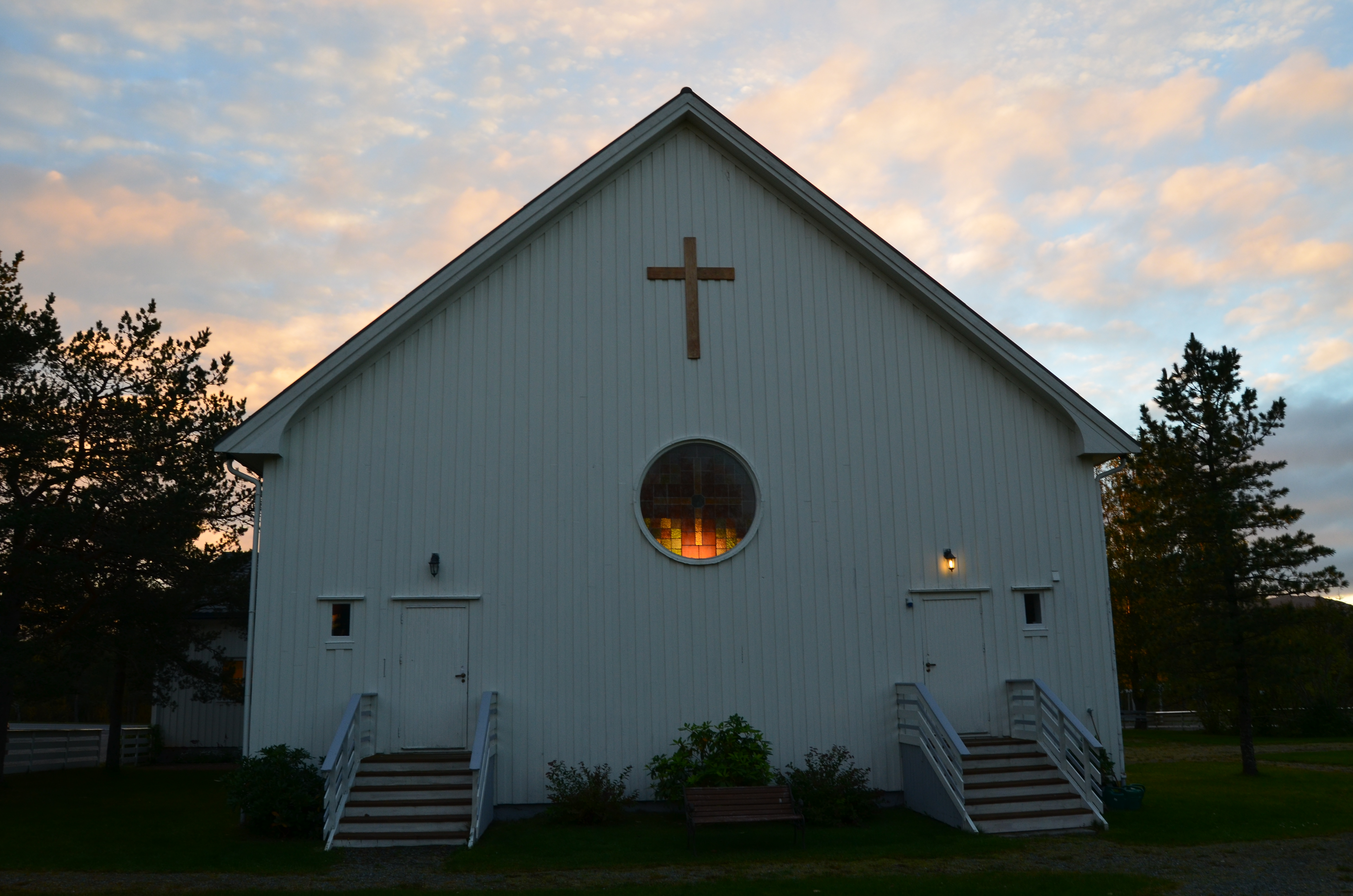 Halsa Kirke Meløy